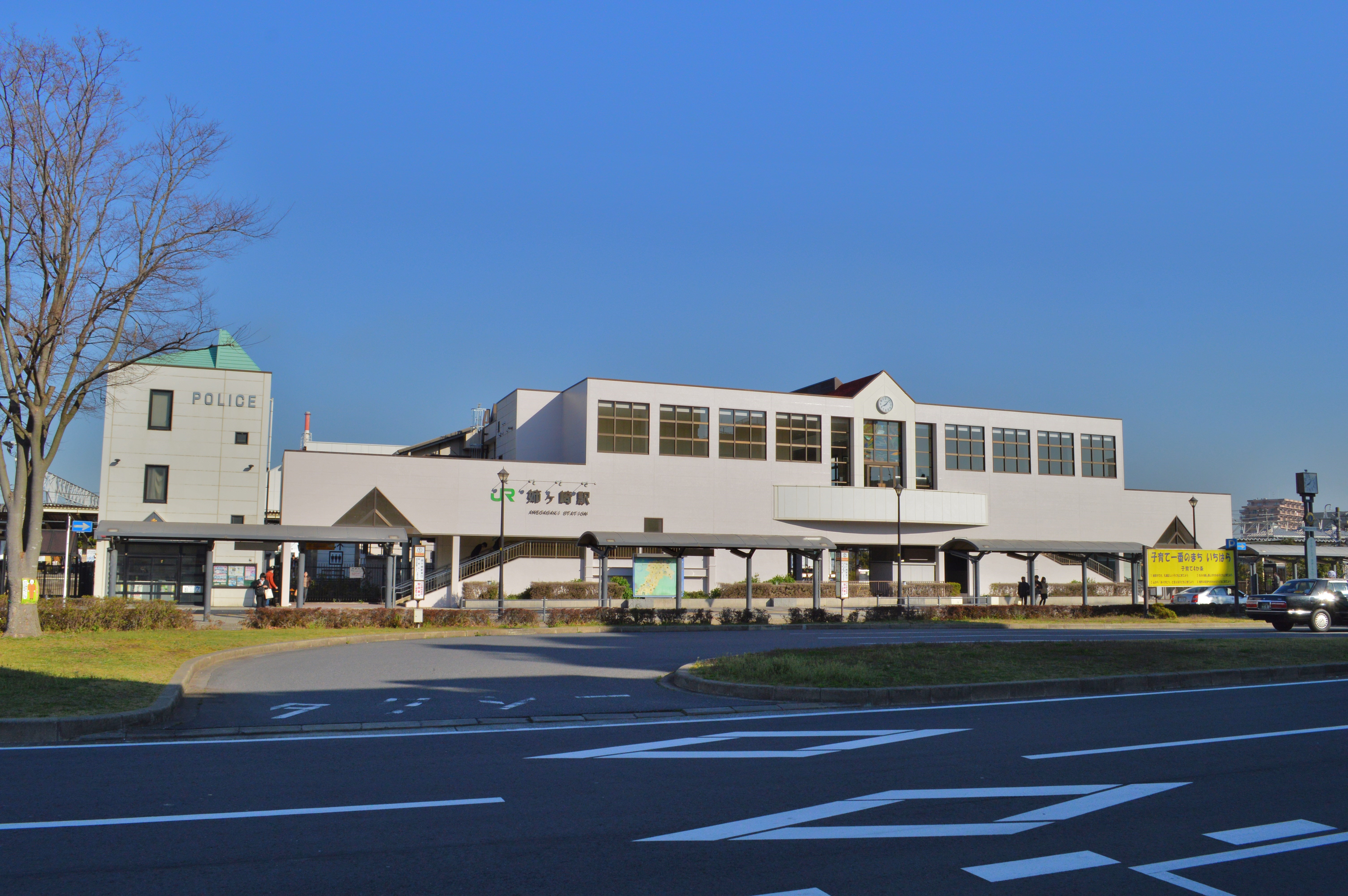 姉ヶ崎駅 駅舎